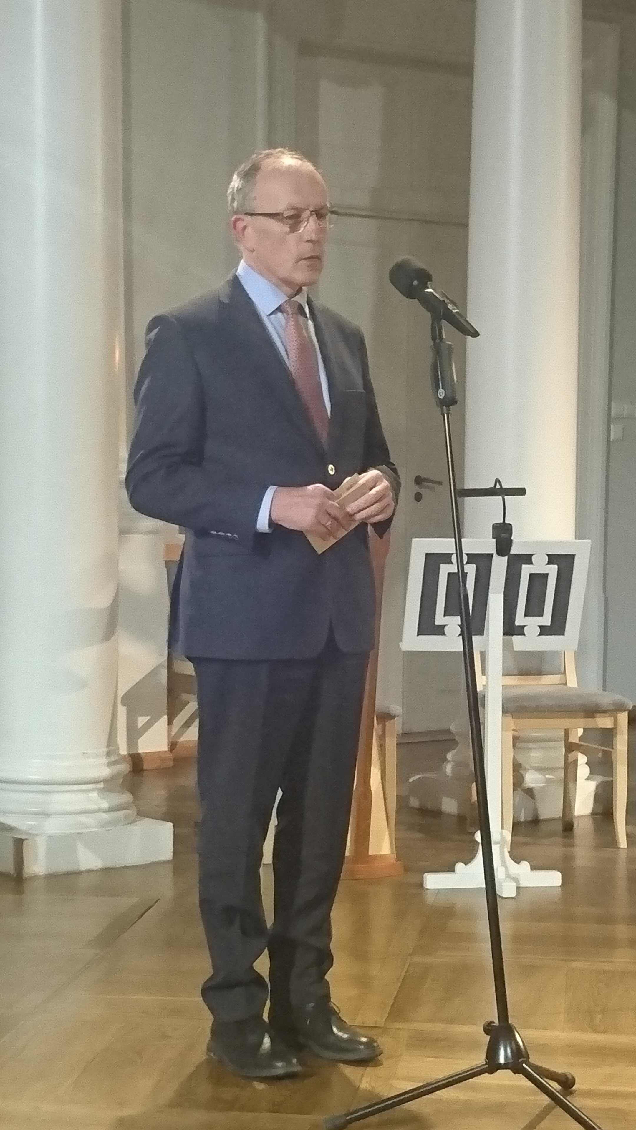 Tartu Ülikooli rektor Toomas Asser esinemas kõnega Gustav Adolfi päeva kontserdil 6. novembril 2019